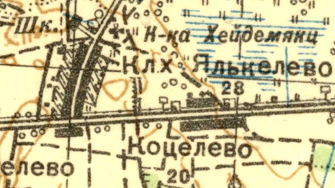 Топографическая карта Ленинградской области, квадрат О-35-12-Г (Ропша), деревни Яльгелево и Коцелово